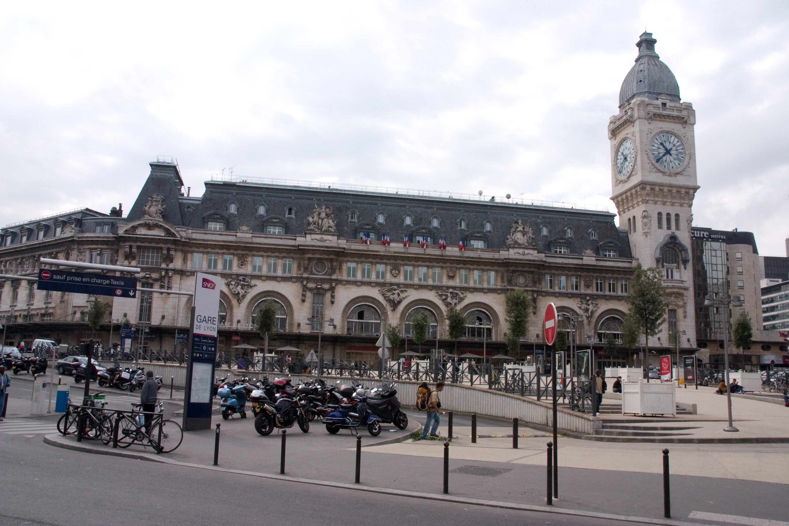 Gare de Lyon, Paris, France